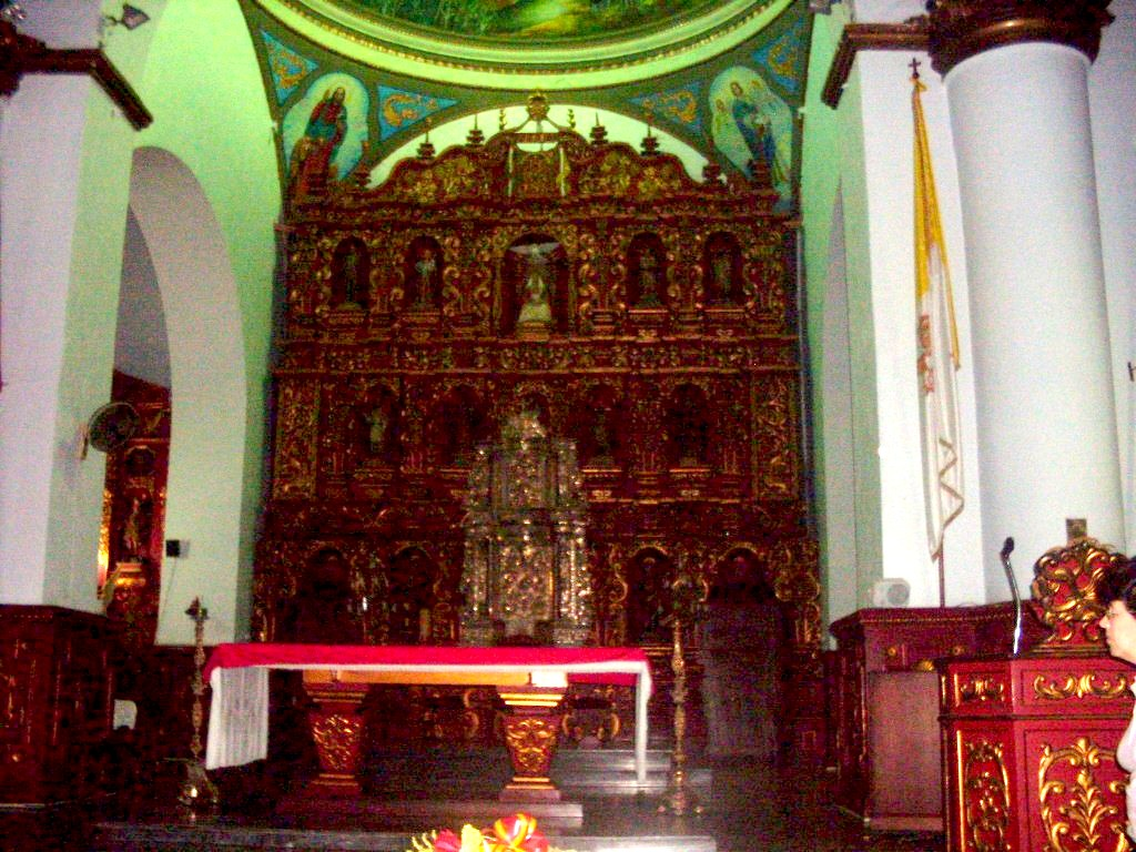 Catedral de Guanare parte interior, en el estado Portuguesa - Venezuela (2010)